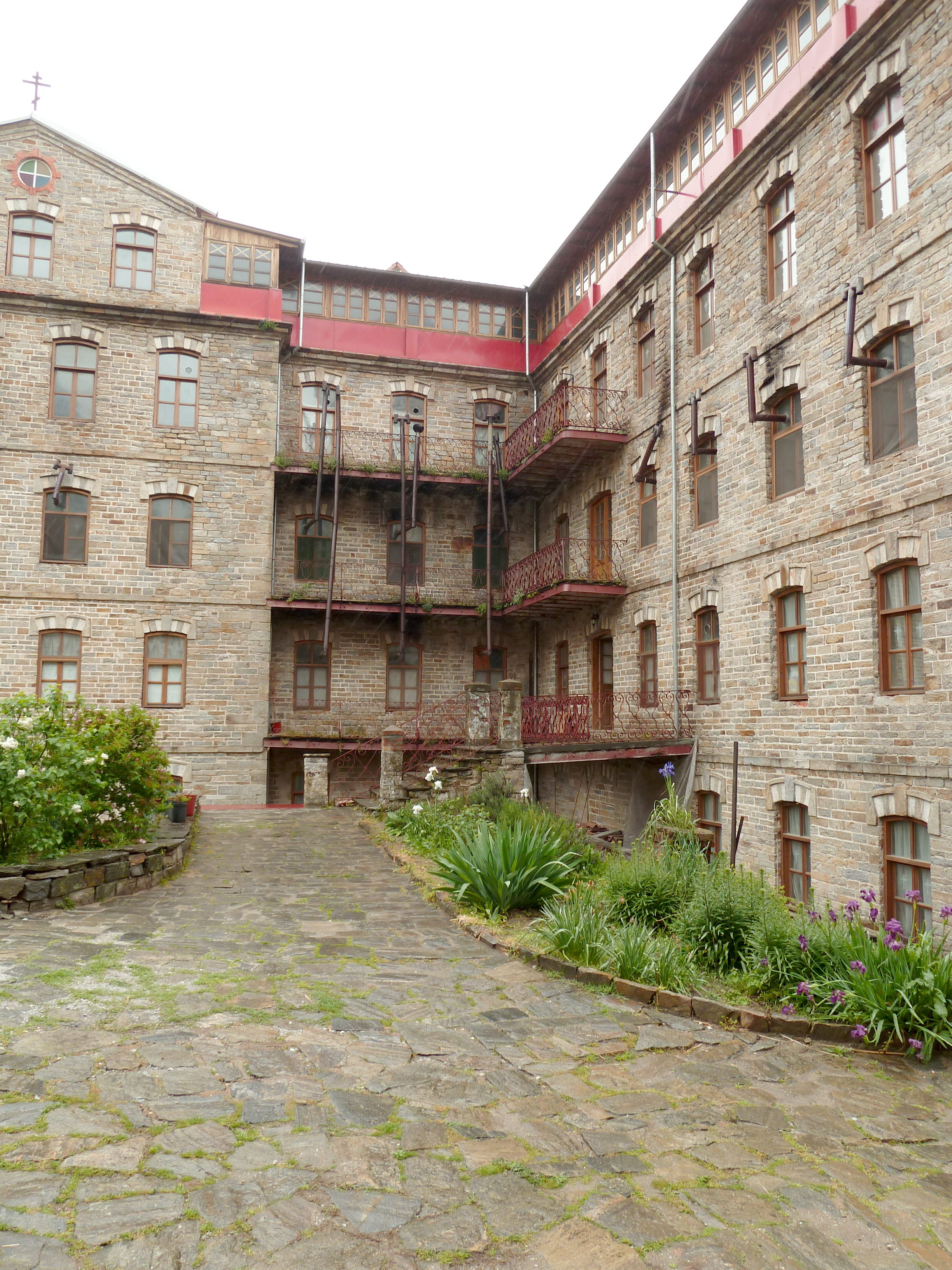 Cour intérieure de la Skite Saint André (Karyes, Mont Athos)